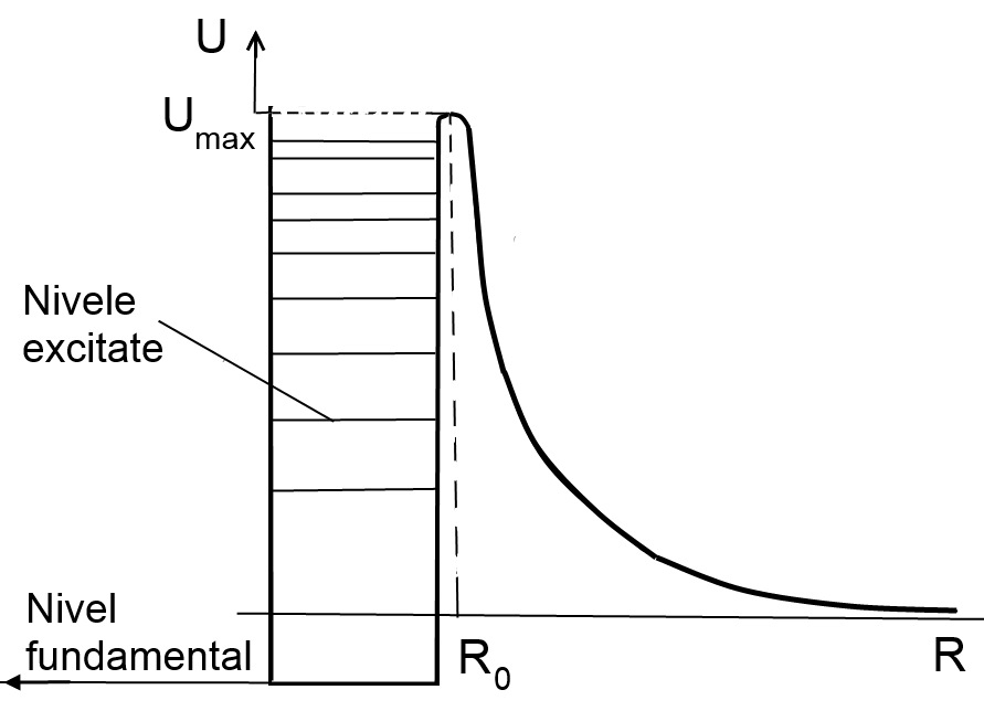 Schemă barieră de potenţial